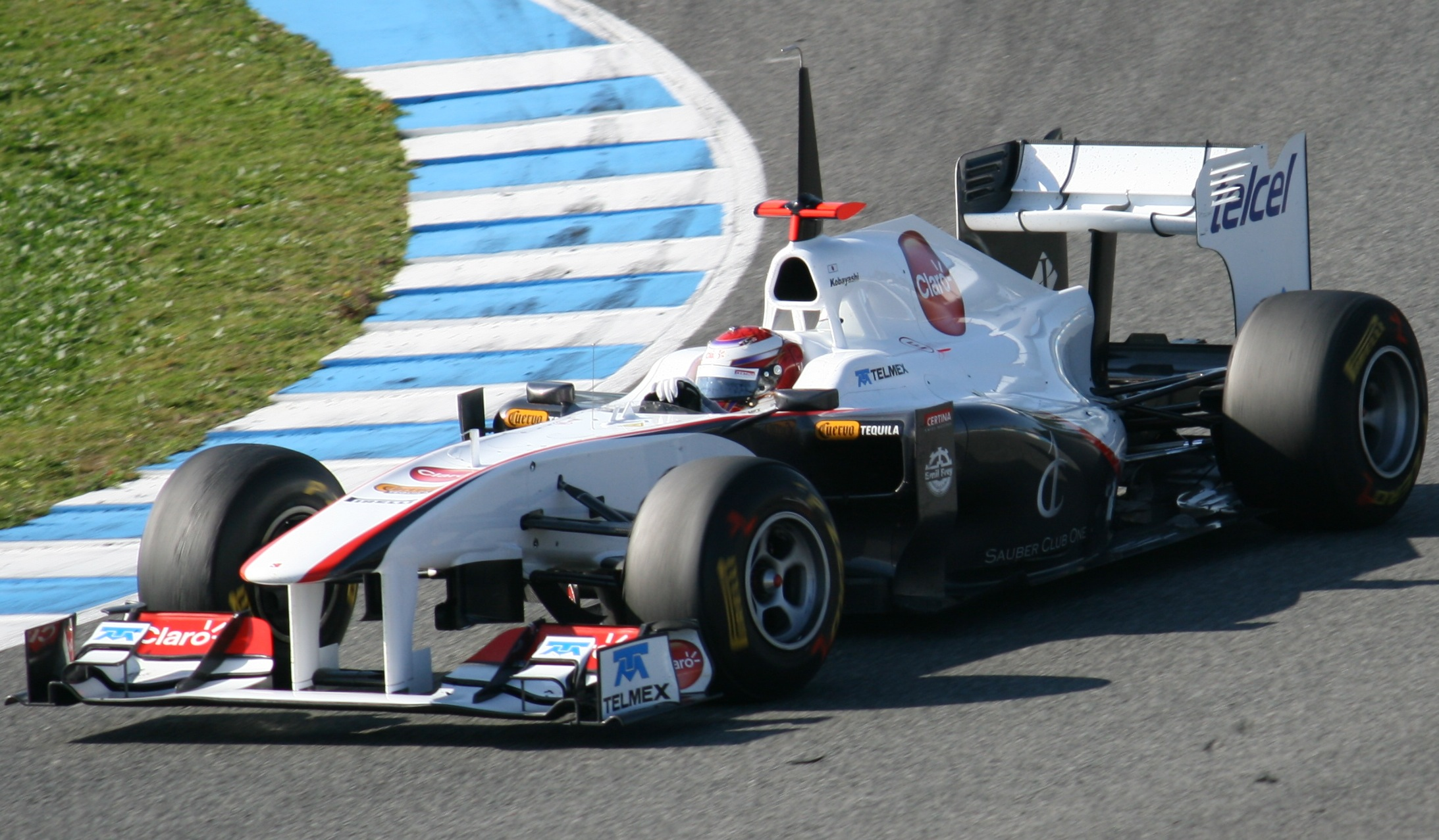 Kamui Kobayashi Sauber C30